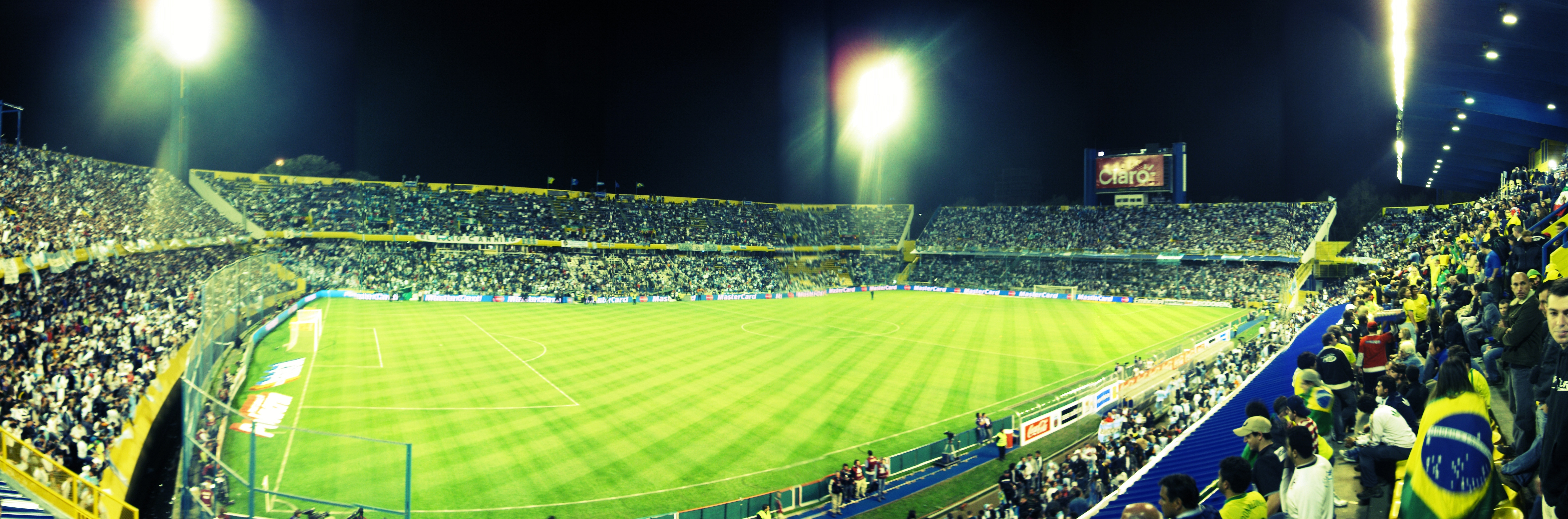 Imagen del Estadio Gigante de Arroyito del Club Atlético Rosario Central en el partido que enfrentó a las selecciones nacionales de Argentina y Brasil el 11 de septiembre de 2009 por las Eliminatorias Sudamericanas para la Copa del Mundo 2010.